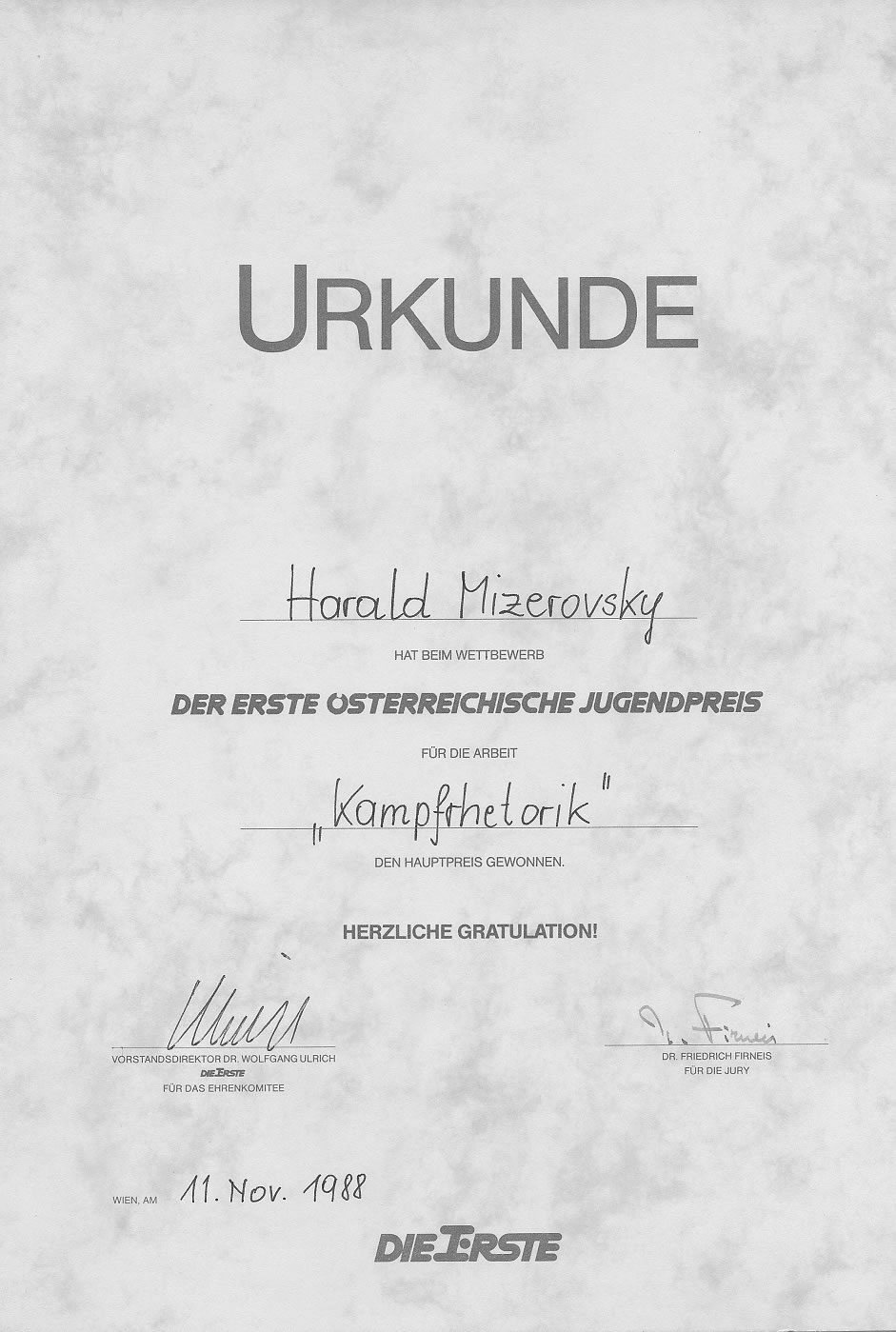 Jugendpreis 1988 für Kampfrhetorik an Harald Mizerovsky überreicht durch den Vorstandsdirektor der Ersten Bank, Dr. Wolfgang Ulrich und Dr. Friedrich Firneis aus der Jury